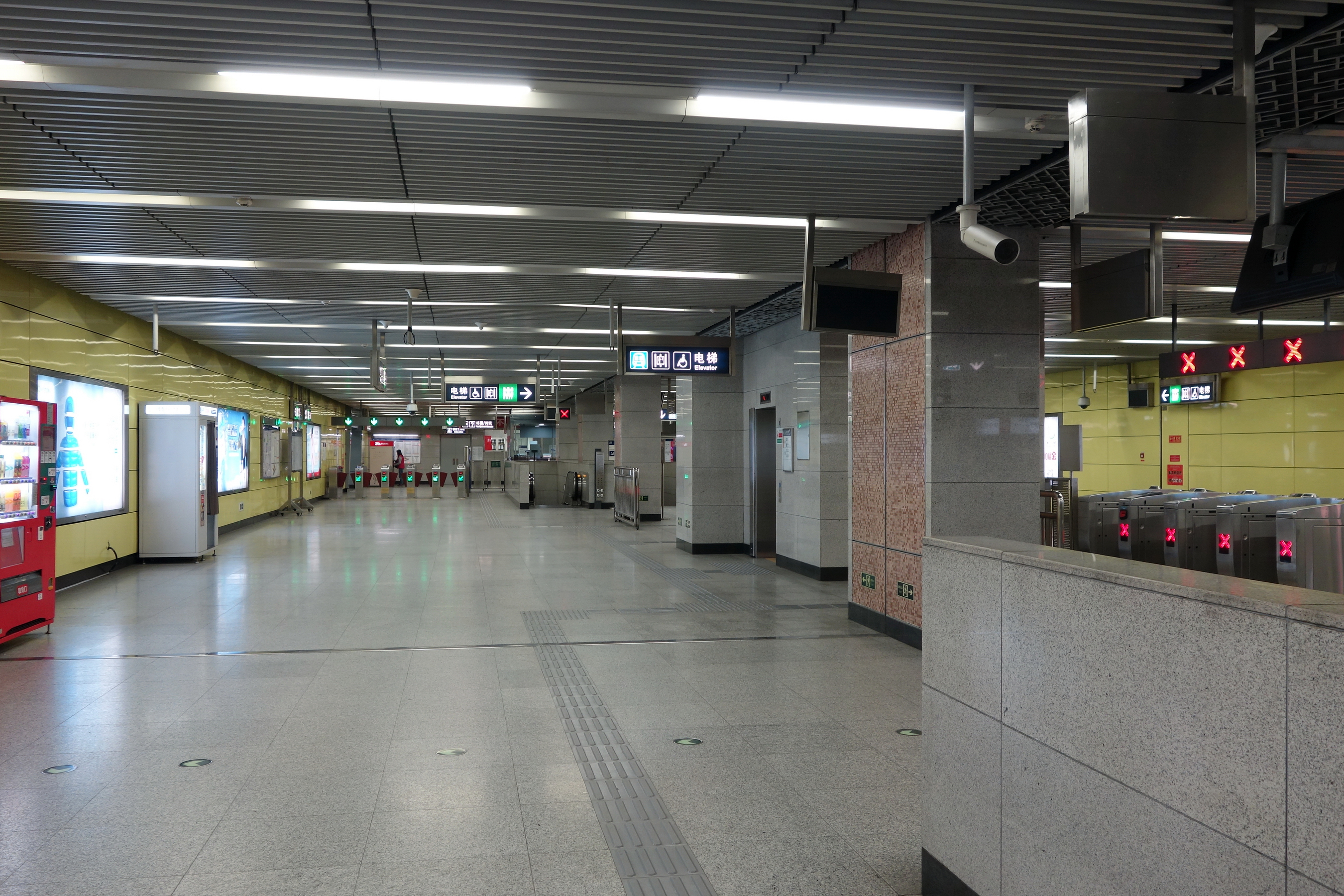 北京地铁4号线魏公村站站厅层